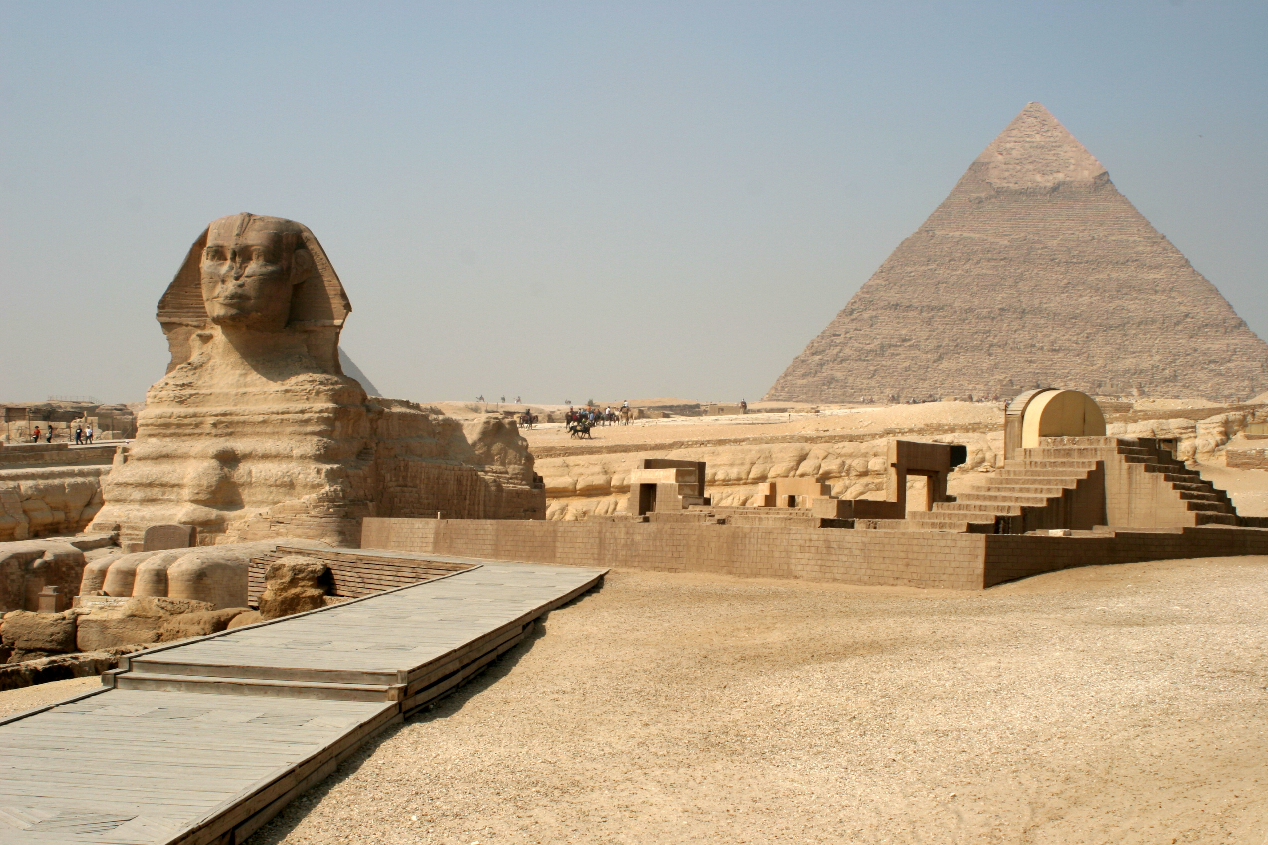 Fotografía de Guiza